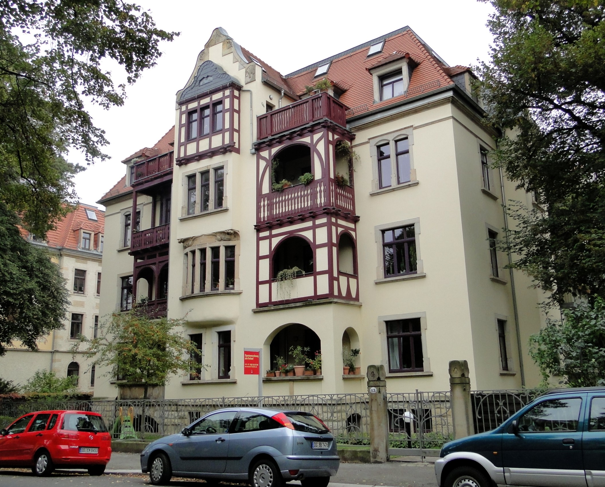 Villa Reinickstraße 13 in Dresden